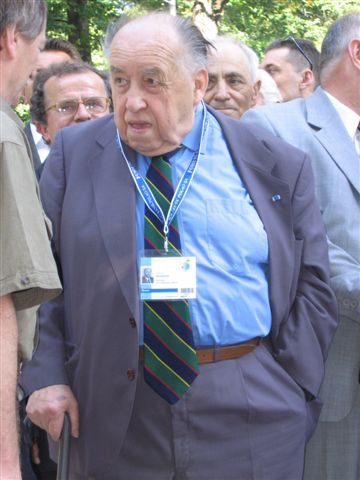 Bohdan Osadchuk (1920-2011), Ukrainian journalist